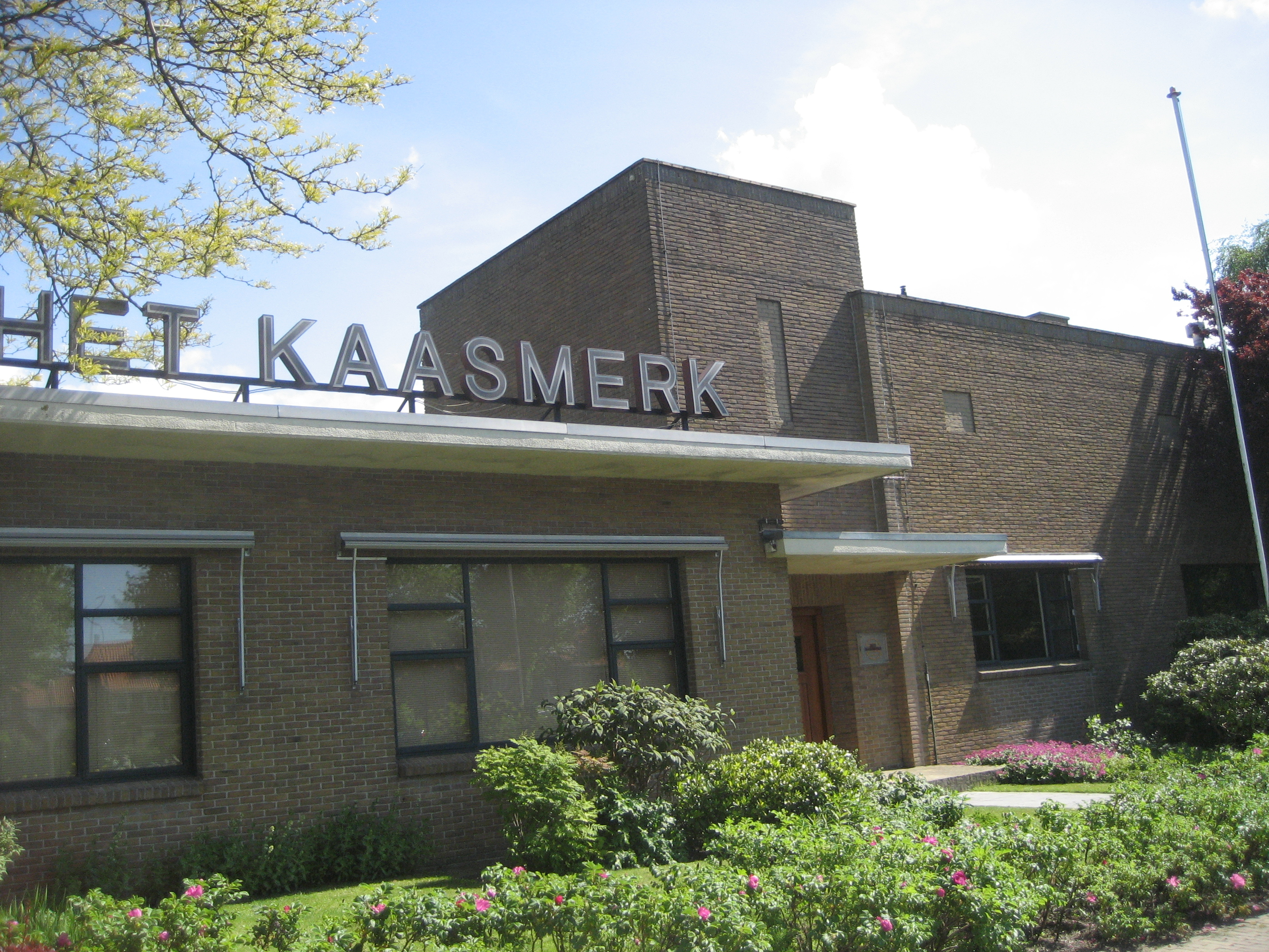 Het Kaasmerk, Roomburgerweg 3a, 2314 XM Leiden (Nederland). Gebouwd in 1926. Architect Geert Stapenséa